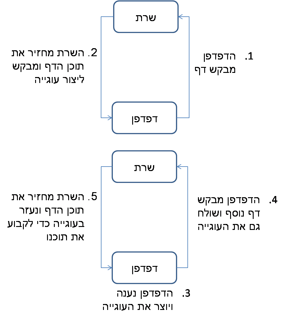 עוגייה